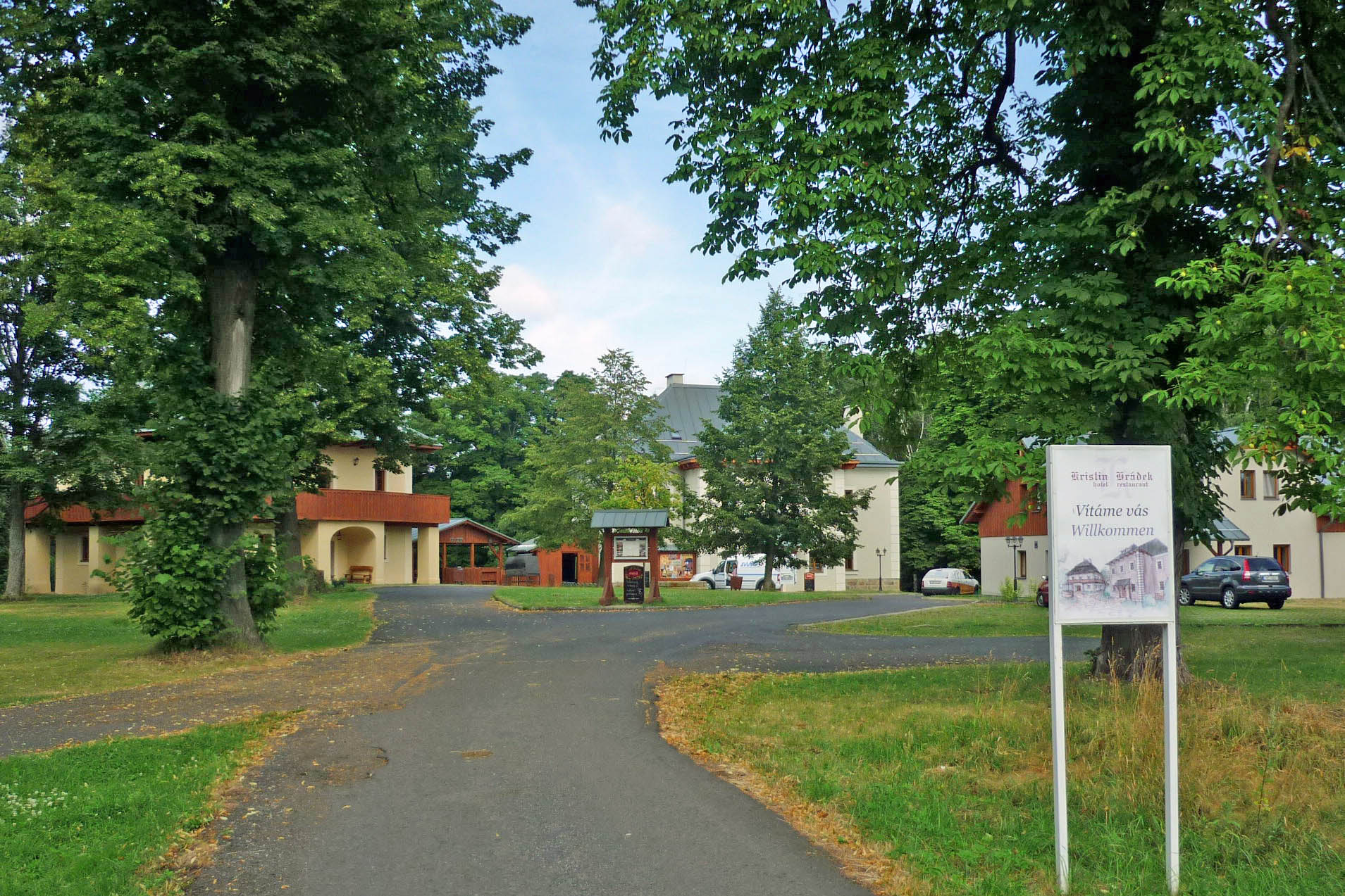 Ehem. Jagdschloss Christianenburg (Kristin Hrádek) in der Böhmischen Schweiz (unweit des Hohen Schneebergs)